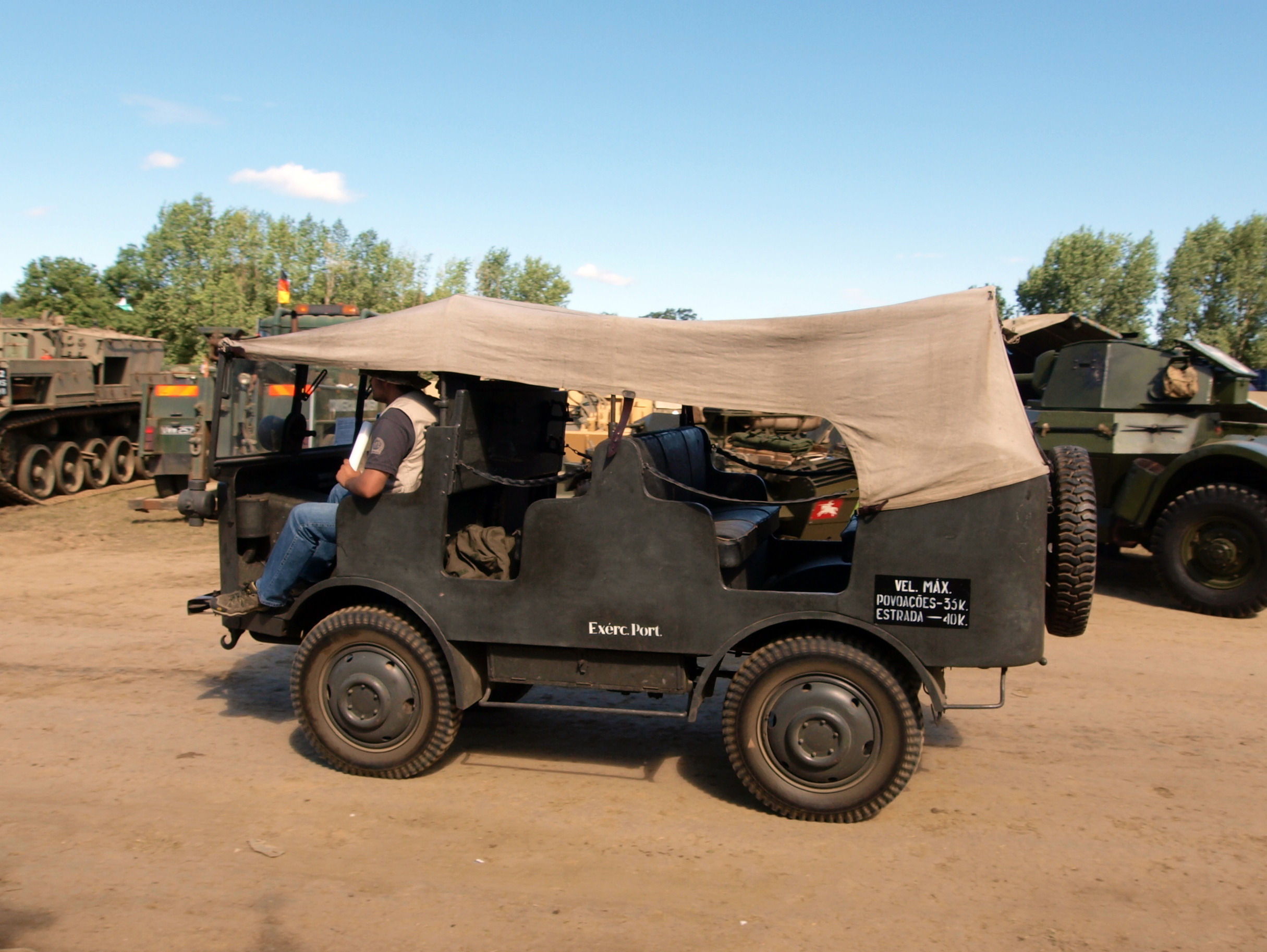 Autocarretta OM